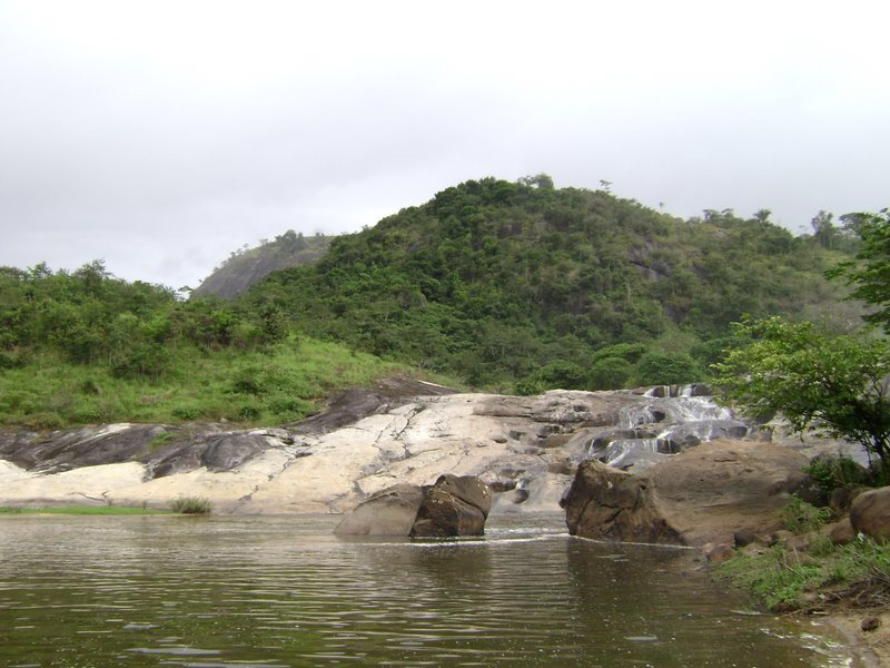 Serra dois irmaos viçosa alagoas